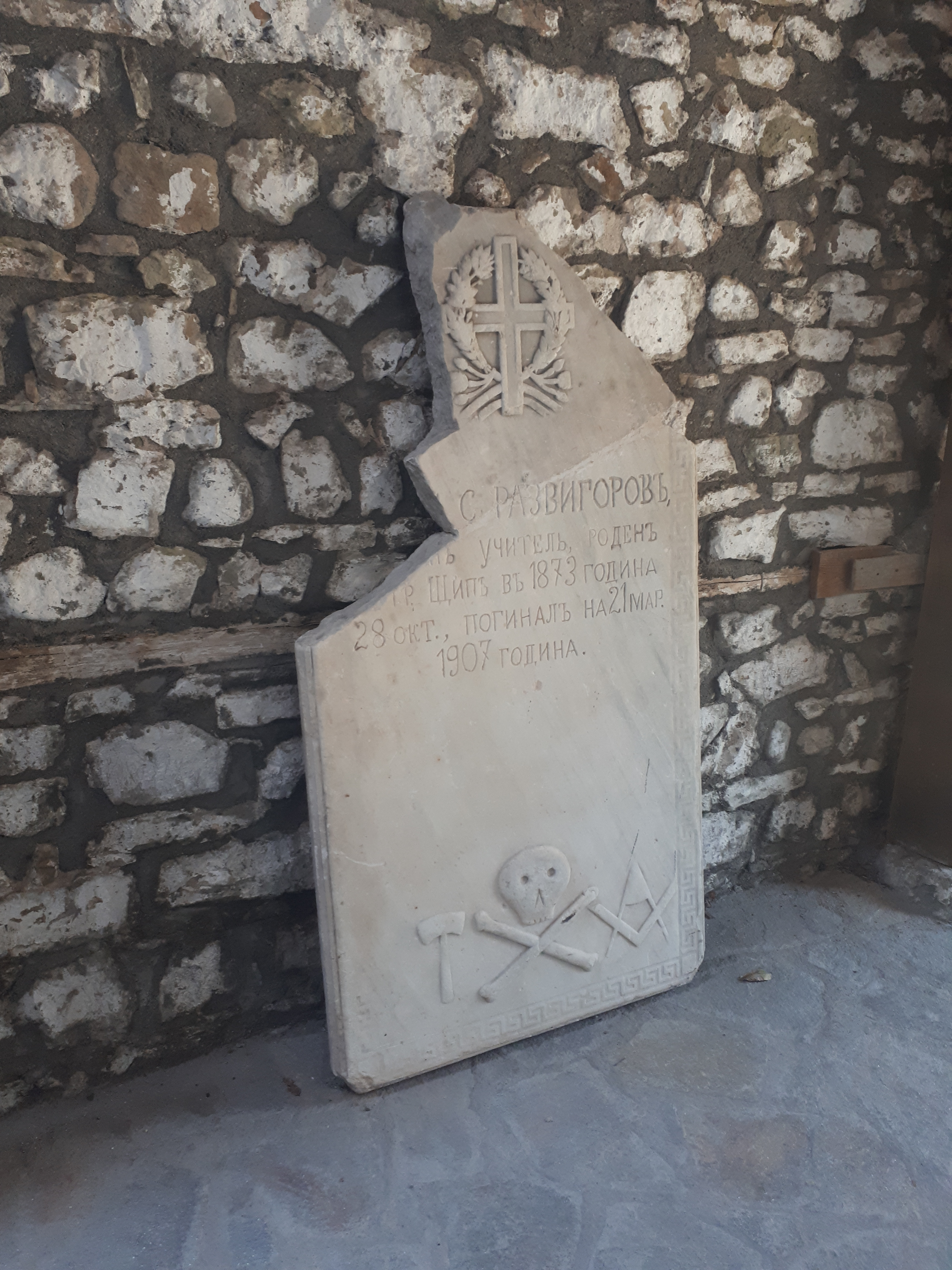 Надгробната плоча на Мише Развигоров во дворот на Музејот на ВМРО во Ново Село, Штип.